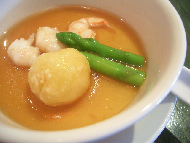 ジャガイモ入りの、つるんとして喉越し柔らかくダシを効かせた茶碗蒸し